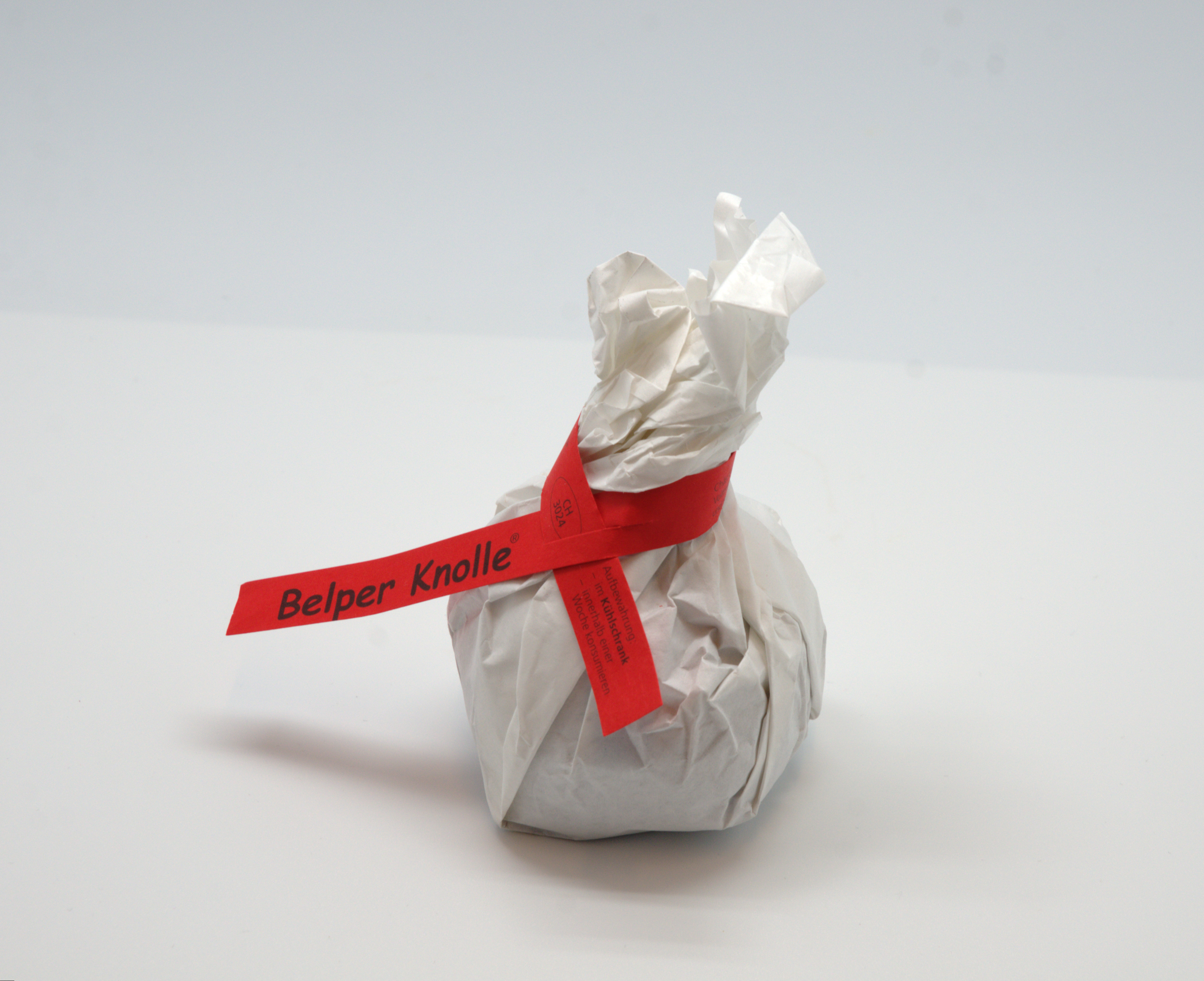 Belper Knolle with packaging, red ribbon, WikiCheese Lausanne.